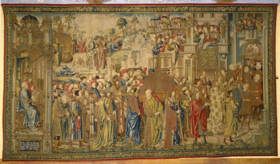 Tapisseries exposées à Ecouen.